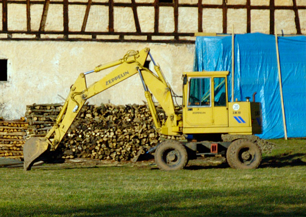 Bagger "Zeppelin"